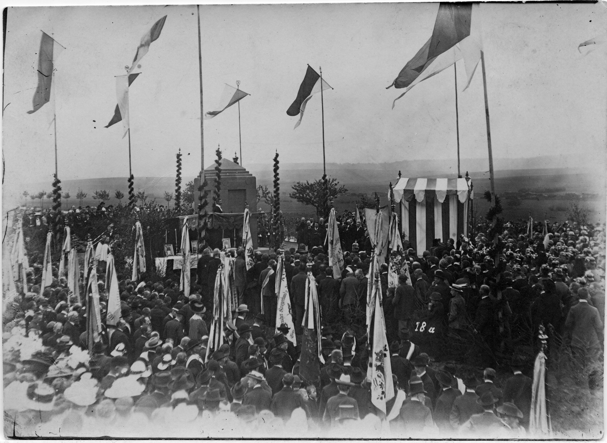 Das Bild zeigt den Festakt am 3. Oktober 1909 in Helmstadt, Bayern, anlässlich der Enthüllung des Prinz-Ludwig-Denkmals durch Prinz Ludwig von Bayern, dem späteren Ludwig III. von Bayern. Während des Deutschen Krieges von 1866 fand am 25. Juli 1866 in der Nähe des Ortes eine Schlacht zwischen preußischen und mit Österreich verbündeten bayrischen Truppen statt, bei der Prinz Ludwig von Bayern eine Schussverletzung erlitt. Die Zeremonie fand unter Anwesenheit von Veteranen des Krieges von 1866 statt.